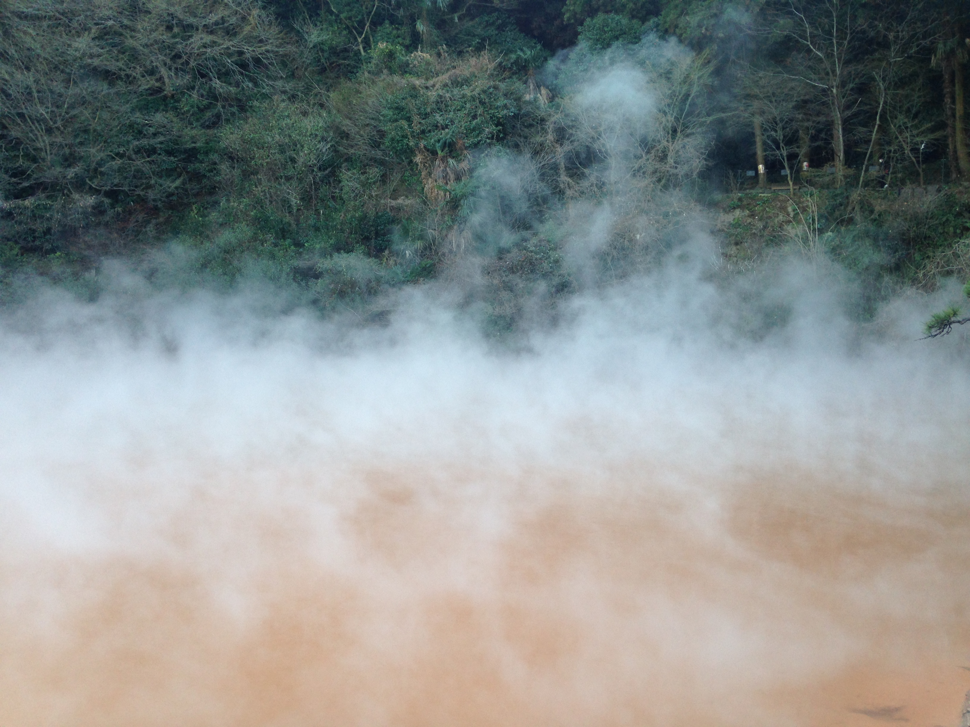 湯煙を上げる血の池地獄